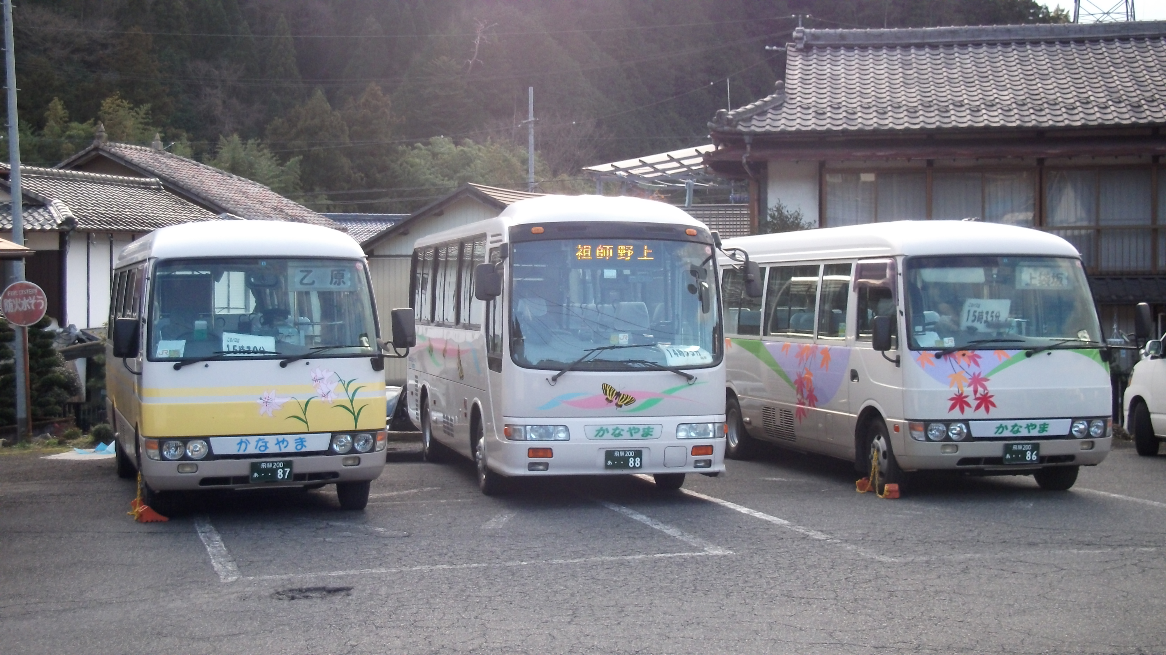 岐阜県下呂市が濃飛乗合自動車に委託して運行しているコミュニティバス（飛騨金山駅前）